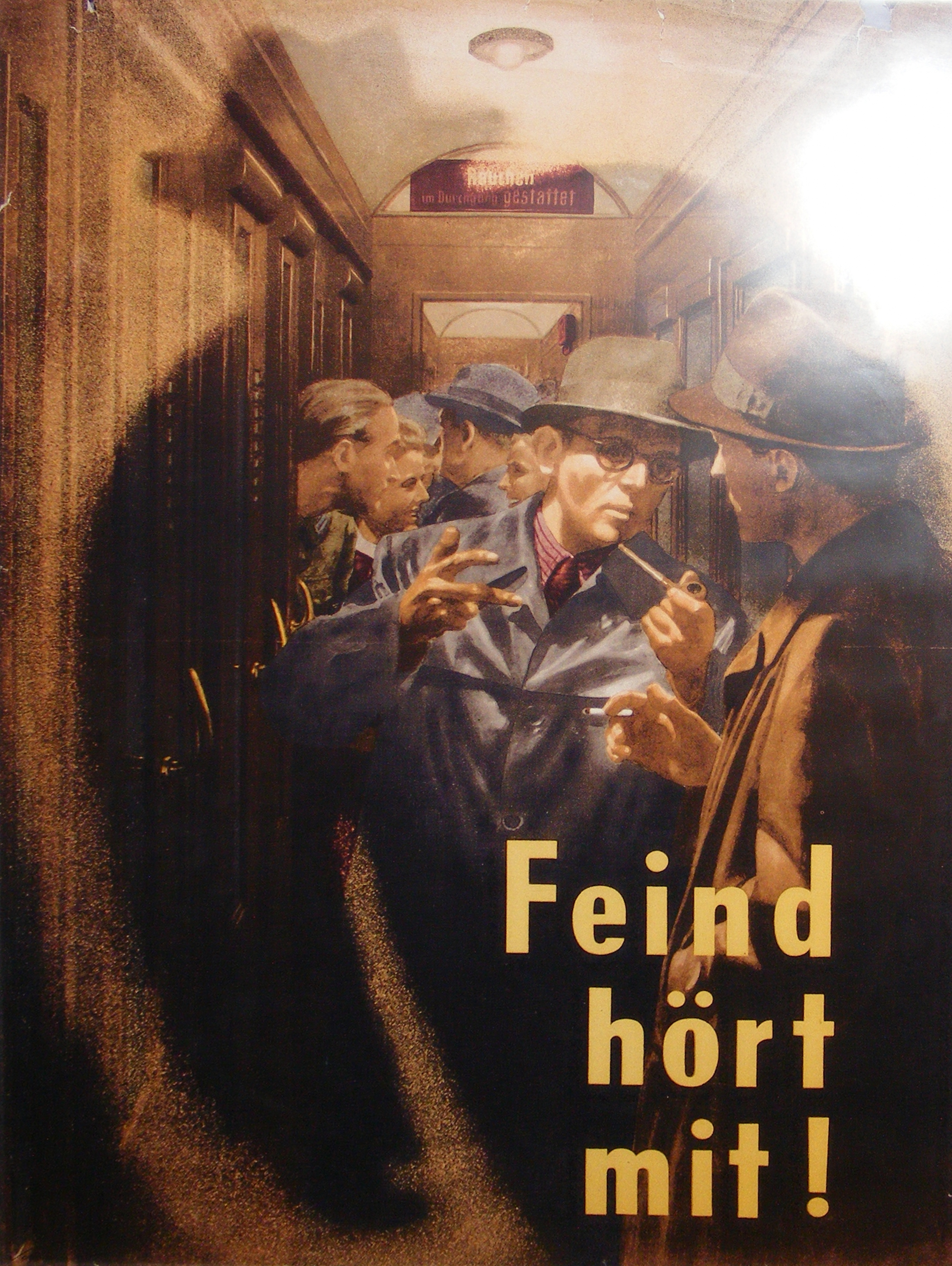 "Feind hört mit!" Plakat gegen das Ausspionieren von Staatsgeheimnissen. Männliche Personen unterhalten sich im Gang eines Eisenbahnwaggons, DB Museum Nürnberg.